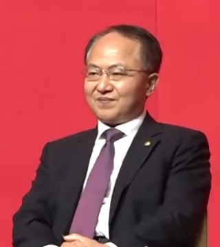 粵語: 中共駐港頭目王志民